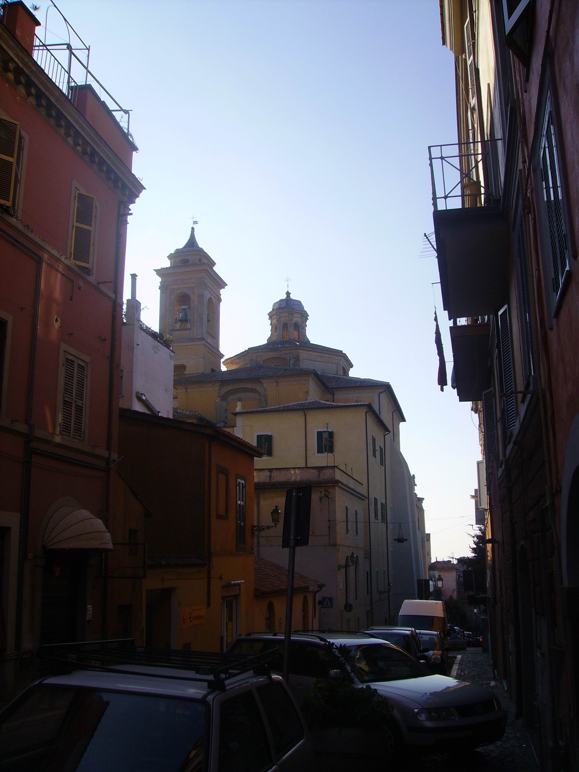 Cupola di San Barnaba vista da Via Garibaldi